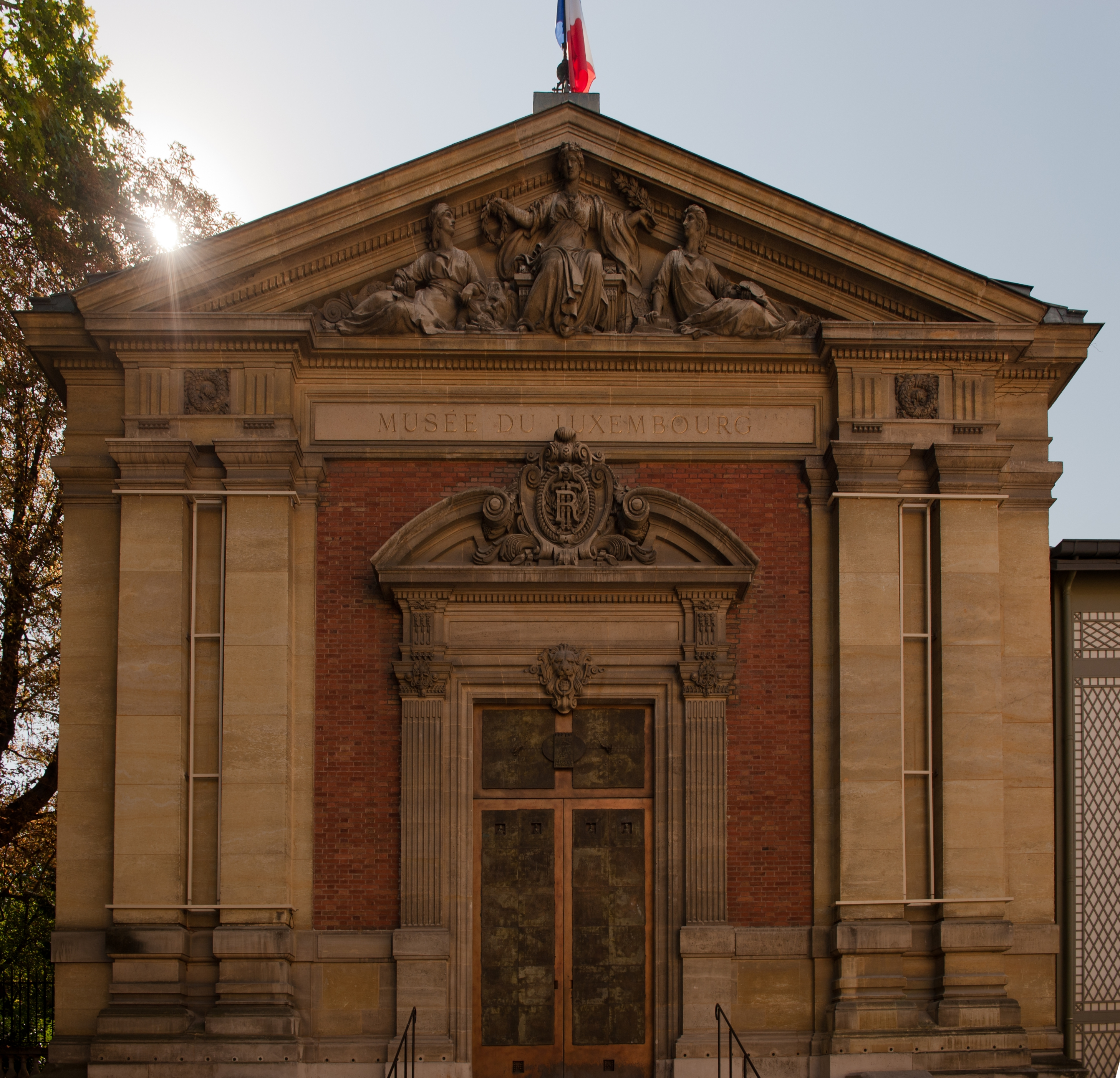 Porte du musée du Luxembourg - Paris - rue de Vaugirard